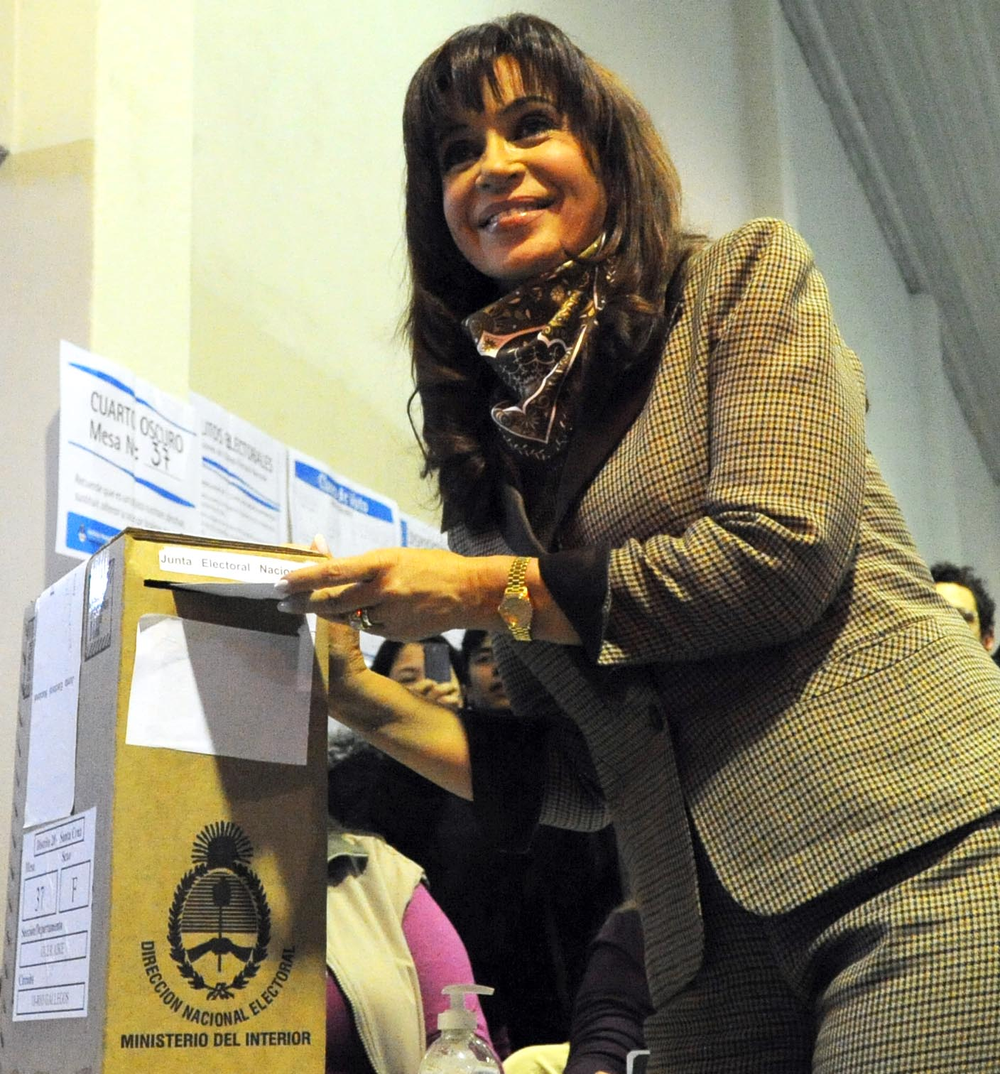 La Presidenta emite su votó en Santa Cruz